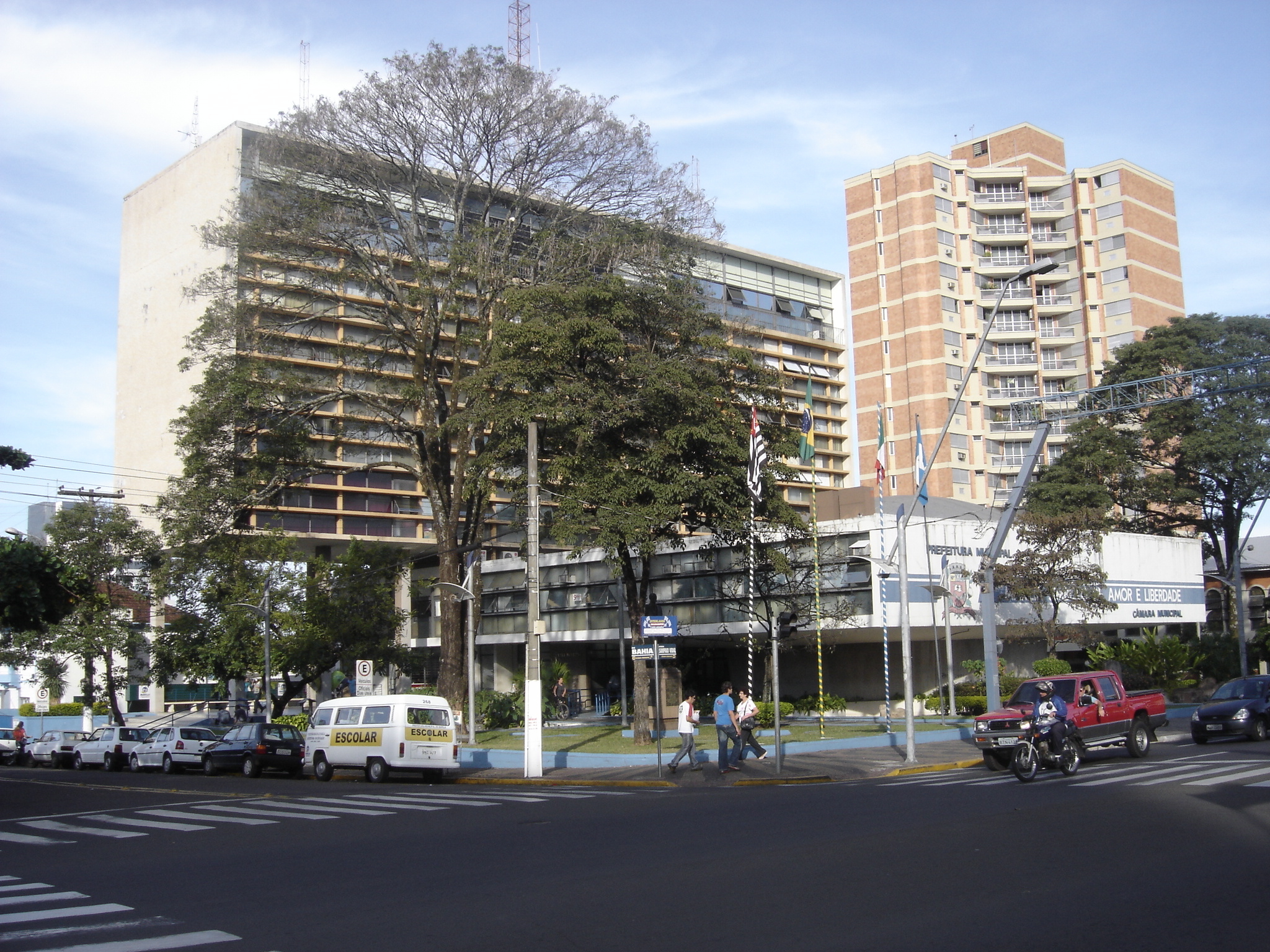 Prefeitura e Câmara Municipal de Marília, São Paulo, Brasil